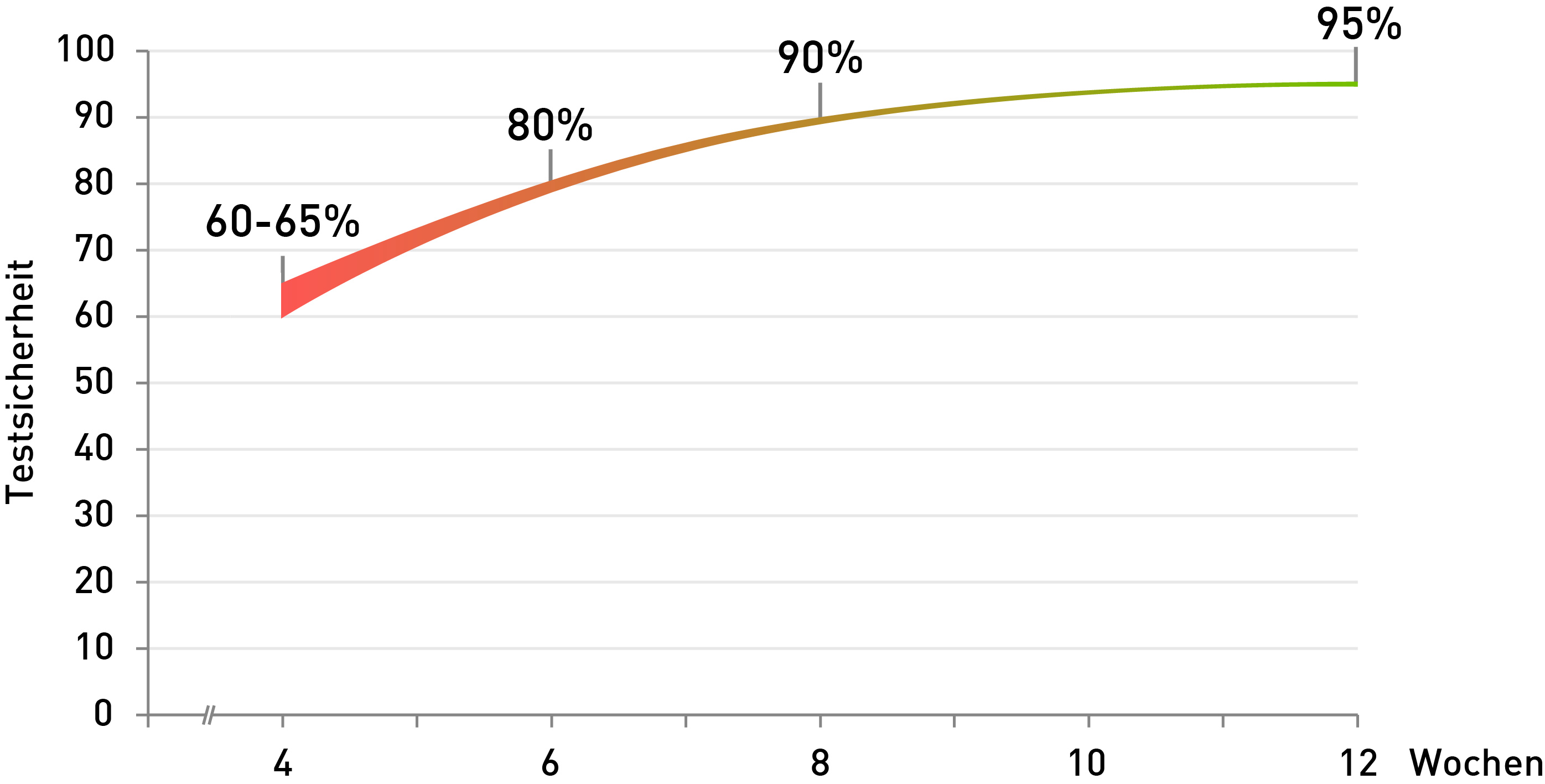 Nachweiswahrscheinlichkeiten für eine bestehende HIV-Infektion bei einem ELISA Suchtests. Quelle: Robert Koch Institut